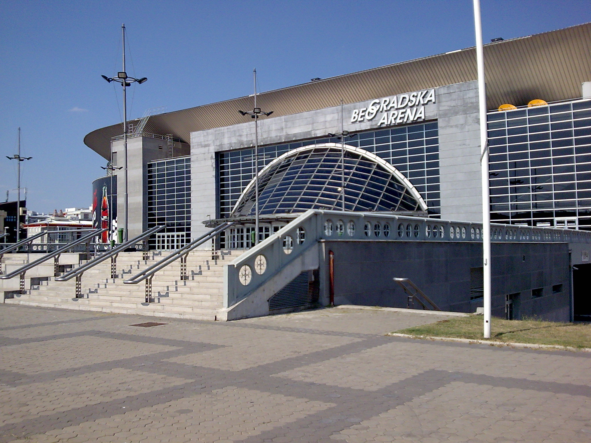 Beogradska Arena